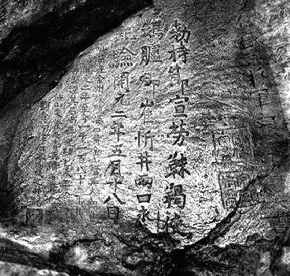 唐鸿胪井刻石原位于旅顺黄金山下，此照片為1895年拍攝。书写文字为“勅持節宣勞靺羯使鴻臚卿崔忻井兩口永為記験開元二年五月十八日”